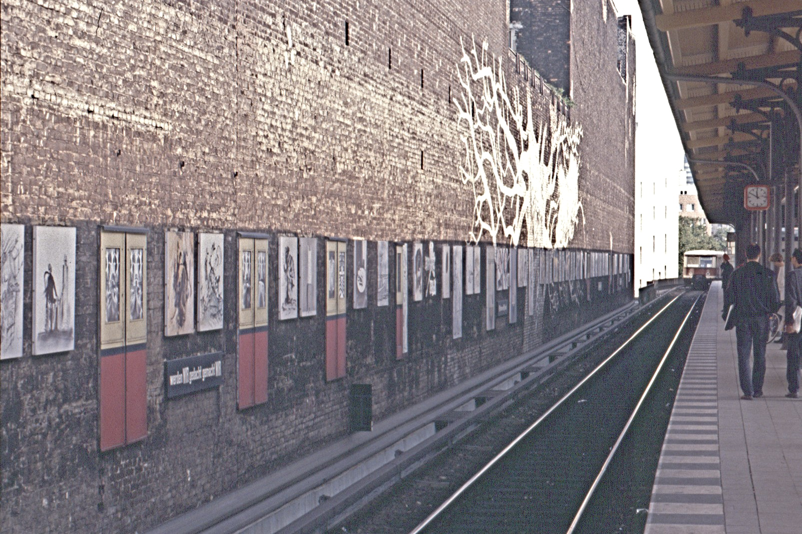 Kunstprojekt Weltenbaum 2 am S-Bahnhof Berlin Savignyplatz